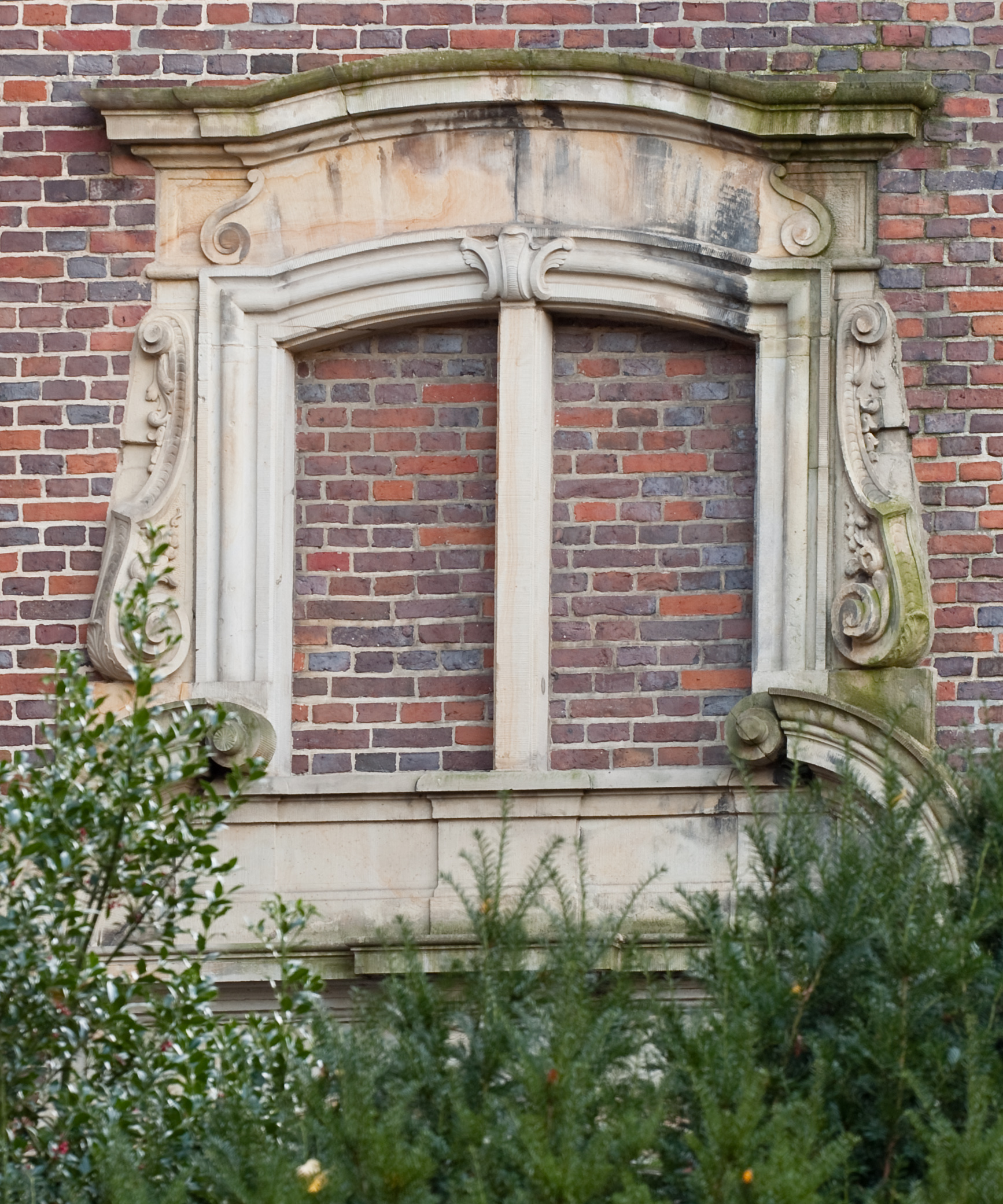 Portal Große Reichenstraße 37, HamburgStandort: Nordseite des Museums für Hamburgische Geschichte; Vorsprung des Großen Hörsaals; OstseiteHerkunft: Große Reichenstraße 37Zustand: Deutliche Mängel